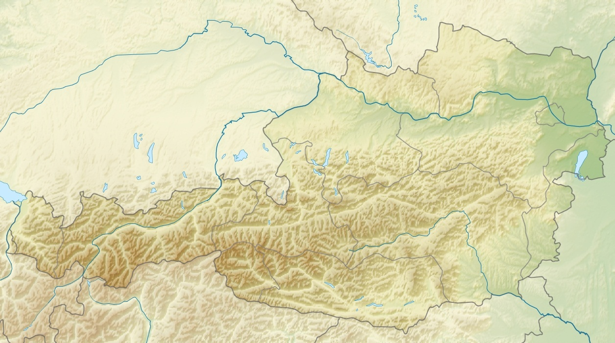 erwqtrewttwrt